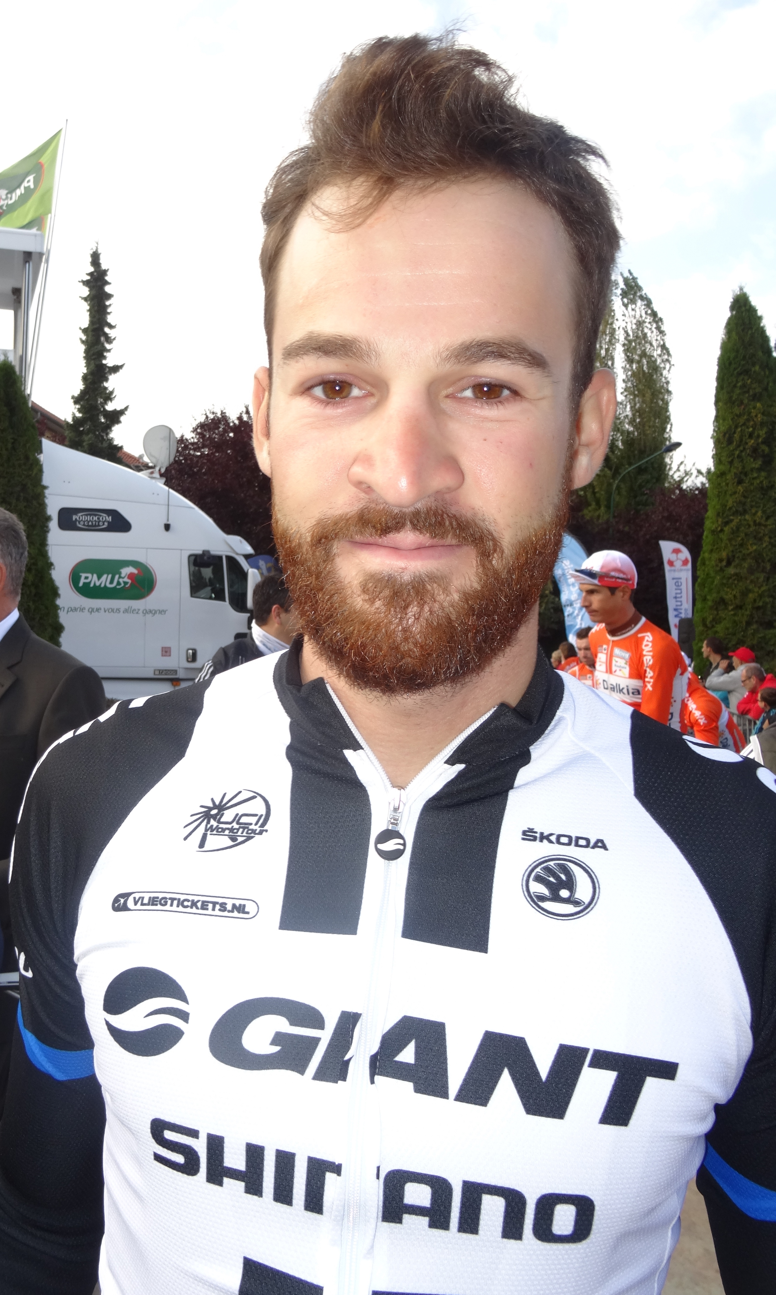 Reportage réalisé le dimanche 21 septembre à l'occasion du départ et de l'arrivée du Grand Prix d'Isbergues 2014 à Isbergues, Nord-Pas-de-Calais, France.